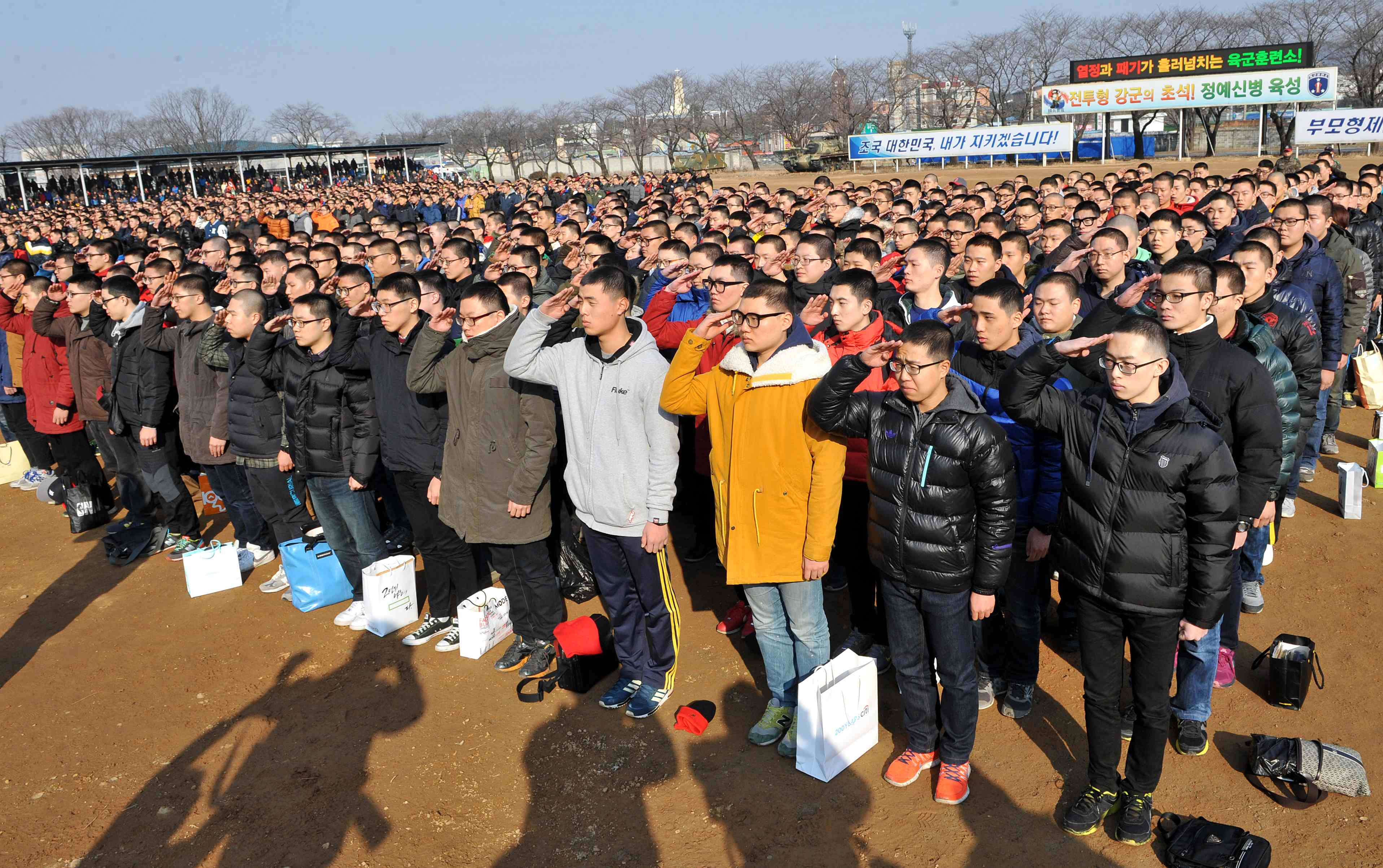 우리나라에서 최대규모를 자랑하는 육군 논산훈련소에서 첫 입영행사가 열렸습니다.